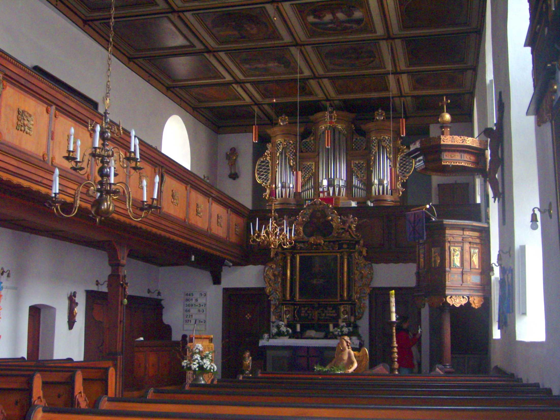 Das Innere der Evang.-Luth. Pfarrkirche Marktleuthen (Bayern, Landkreis Wunsiedel) Eigene Aufnahme vom 7. März 2007